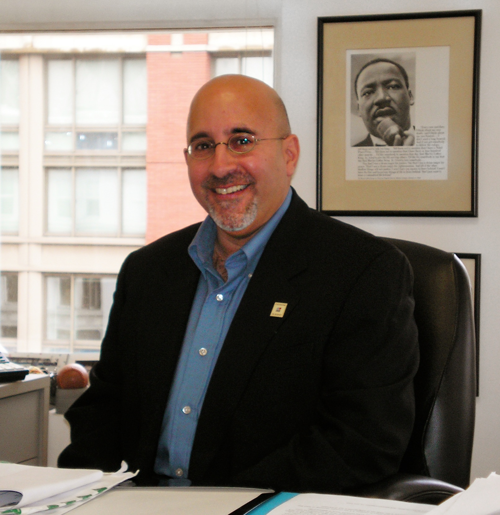 Evan Wolfson